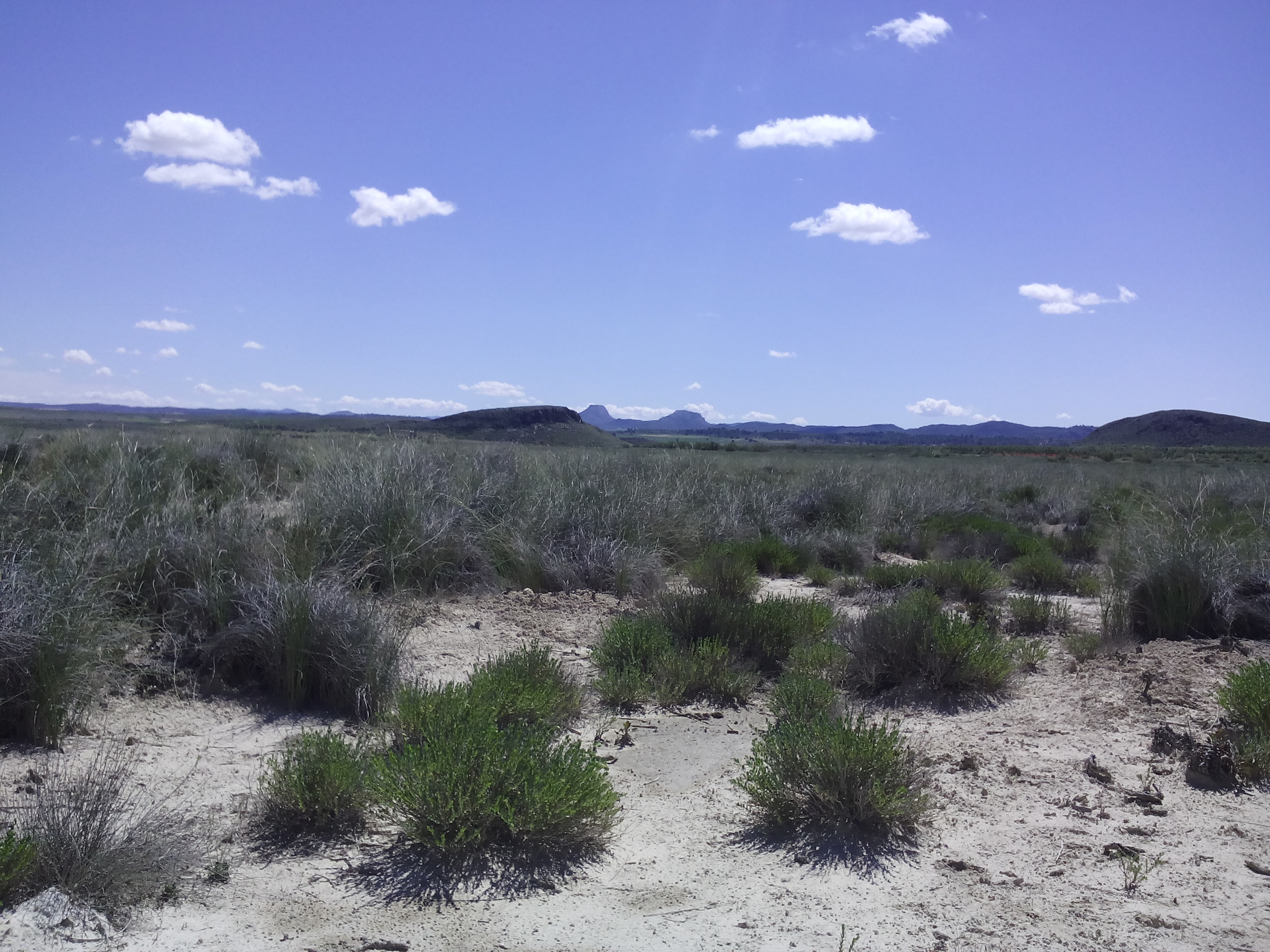 Vista de la población de Helianthemun polygonoides, albardinares salinos y al fondo Las Hermanas de Hellín y Jumilla This is a photography of a Special Area of Conservation in Spain with the ID: ES4210011. Natura2000 entry, EEA entry